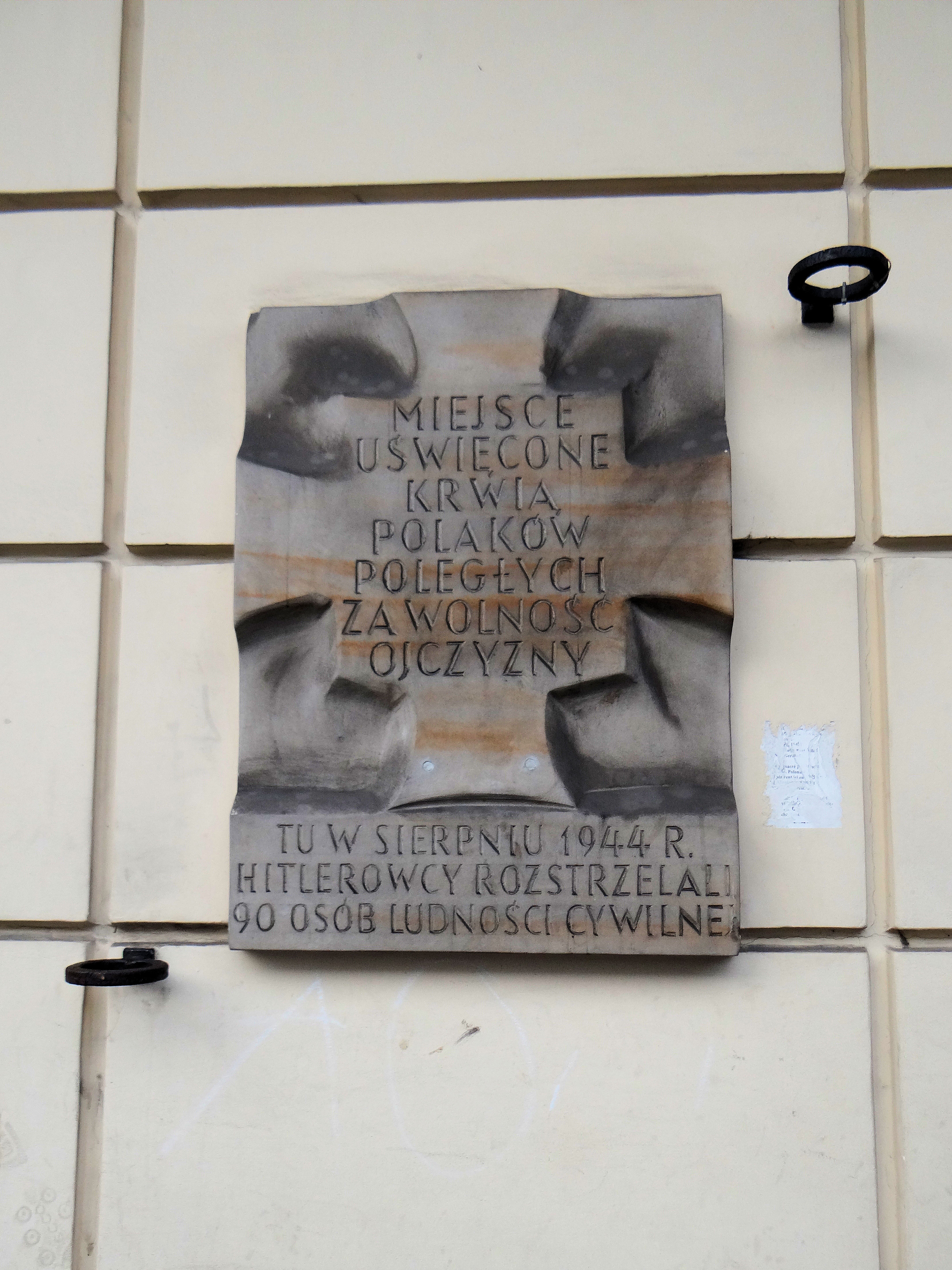 Miejsce pamięci narodowej: w sierpniu 1944 r hitlerowcy rozstrzelali w tym miejscu 90 osób ludności cywilnej